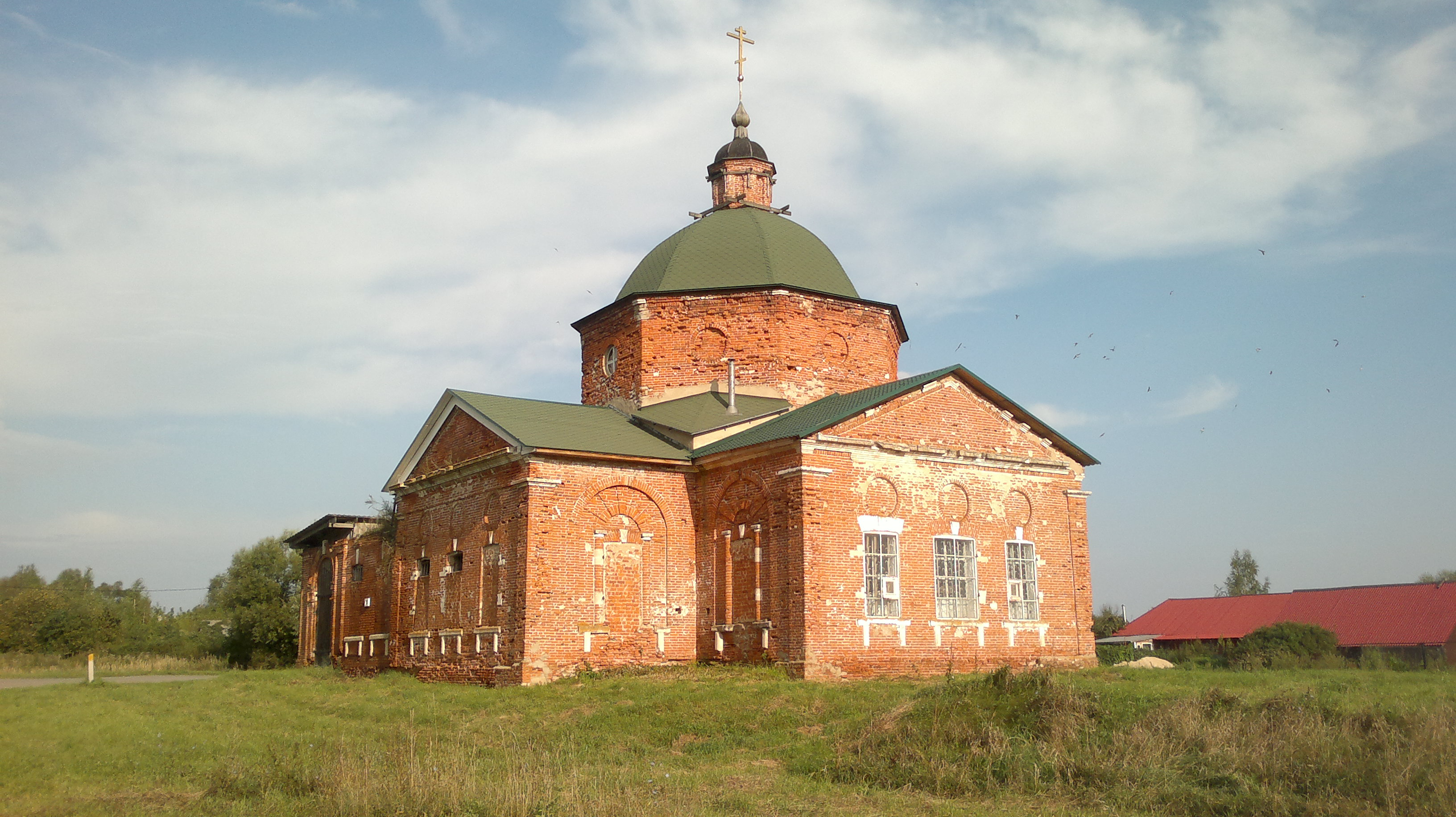 Троицкая церковь: Заполье, Шиловский район, Рязанская область